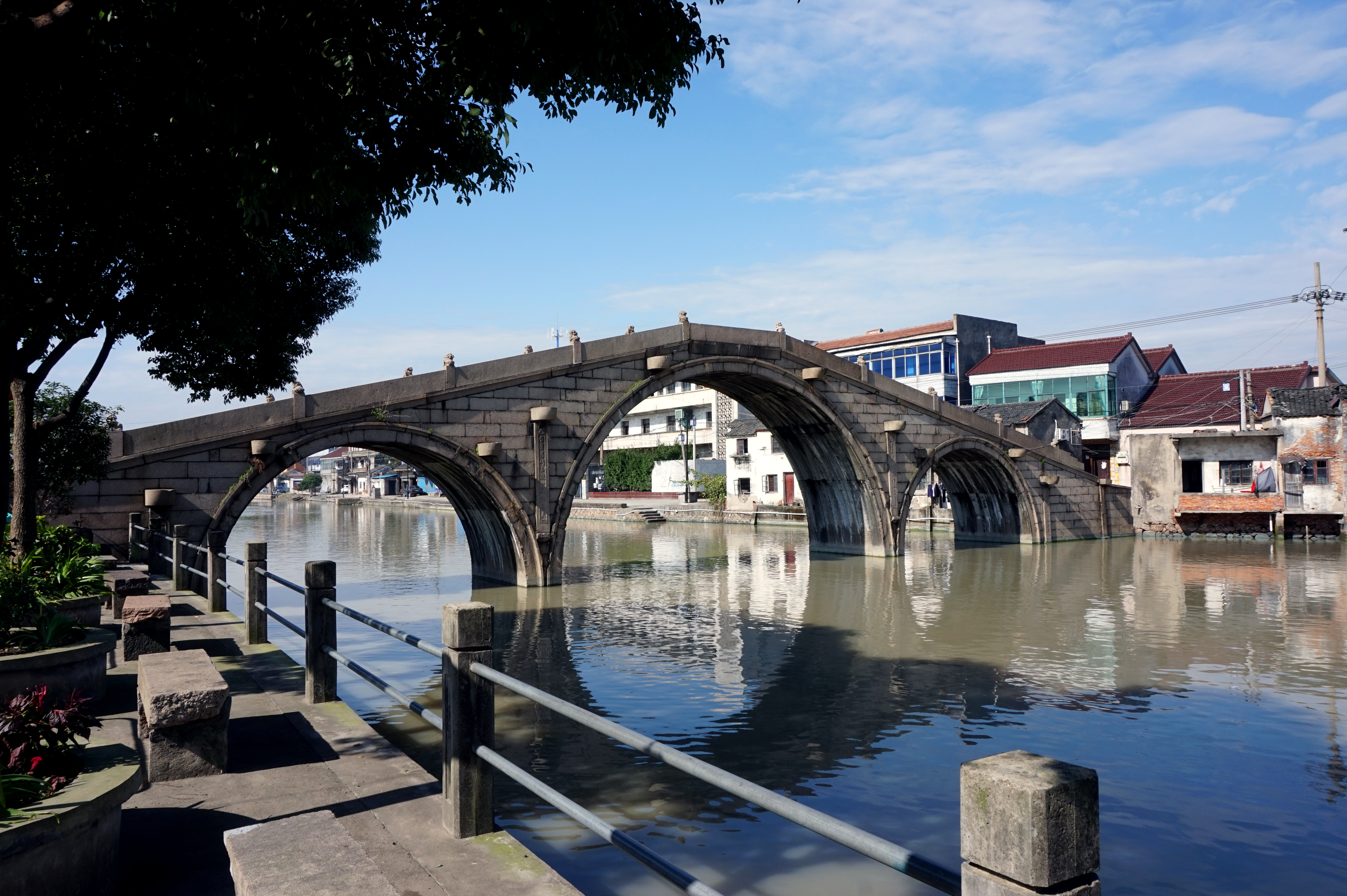 双林三桥——万元桥。